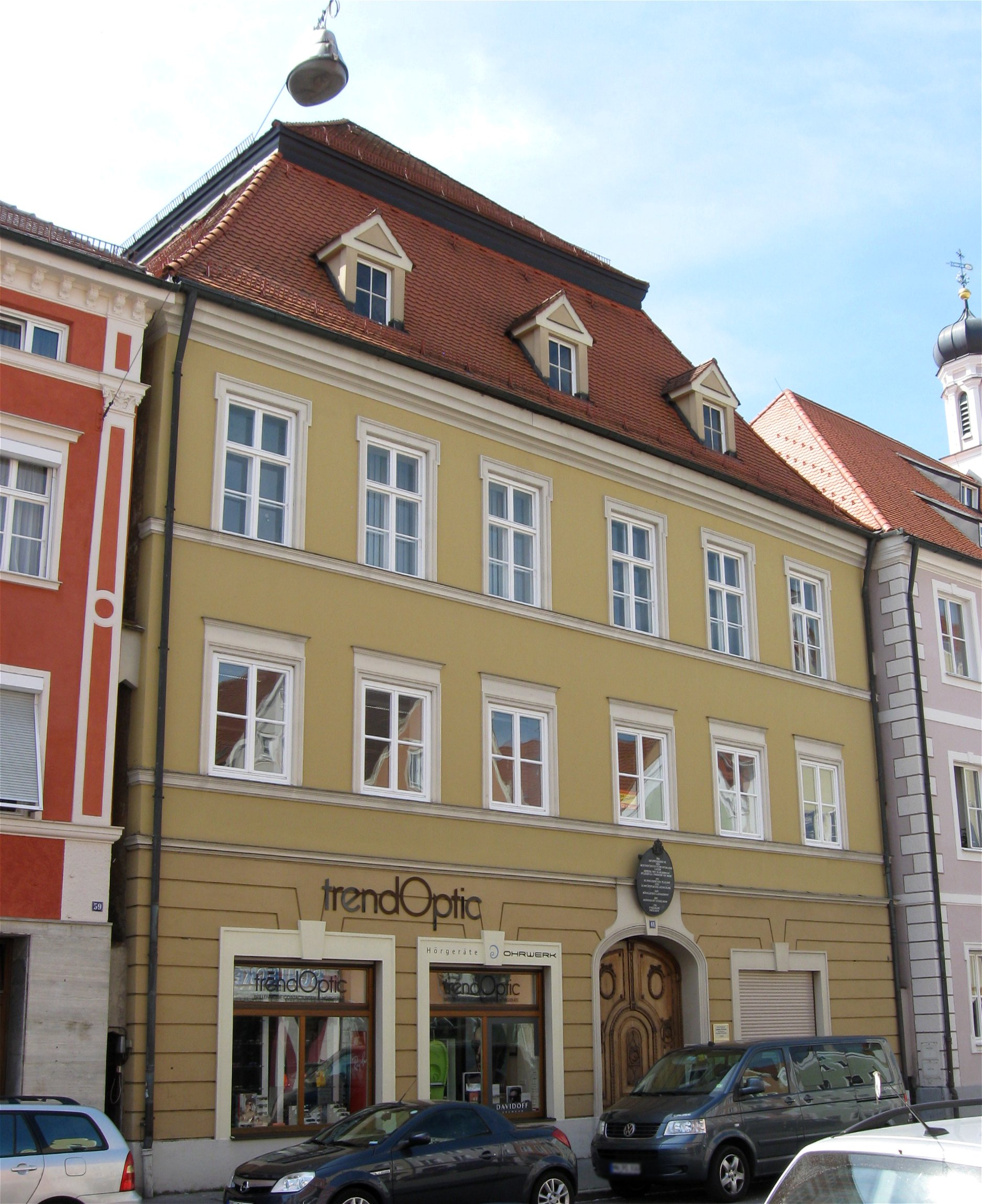 Maximilianstraße 61; Ehem. Pfleghaus, dreigeschossiger Mansardwalmdachbau mit profiliertem Traufgesims, Anfang 18. Jahrhundert, Dach wohl Ende 18. Jahrhundert. D-7-78-173-100